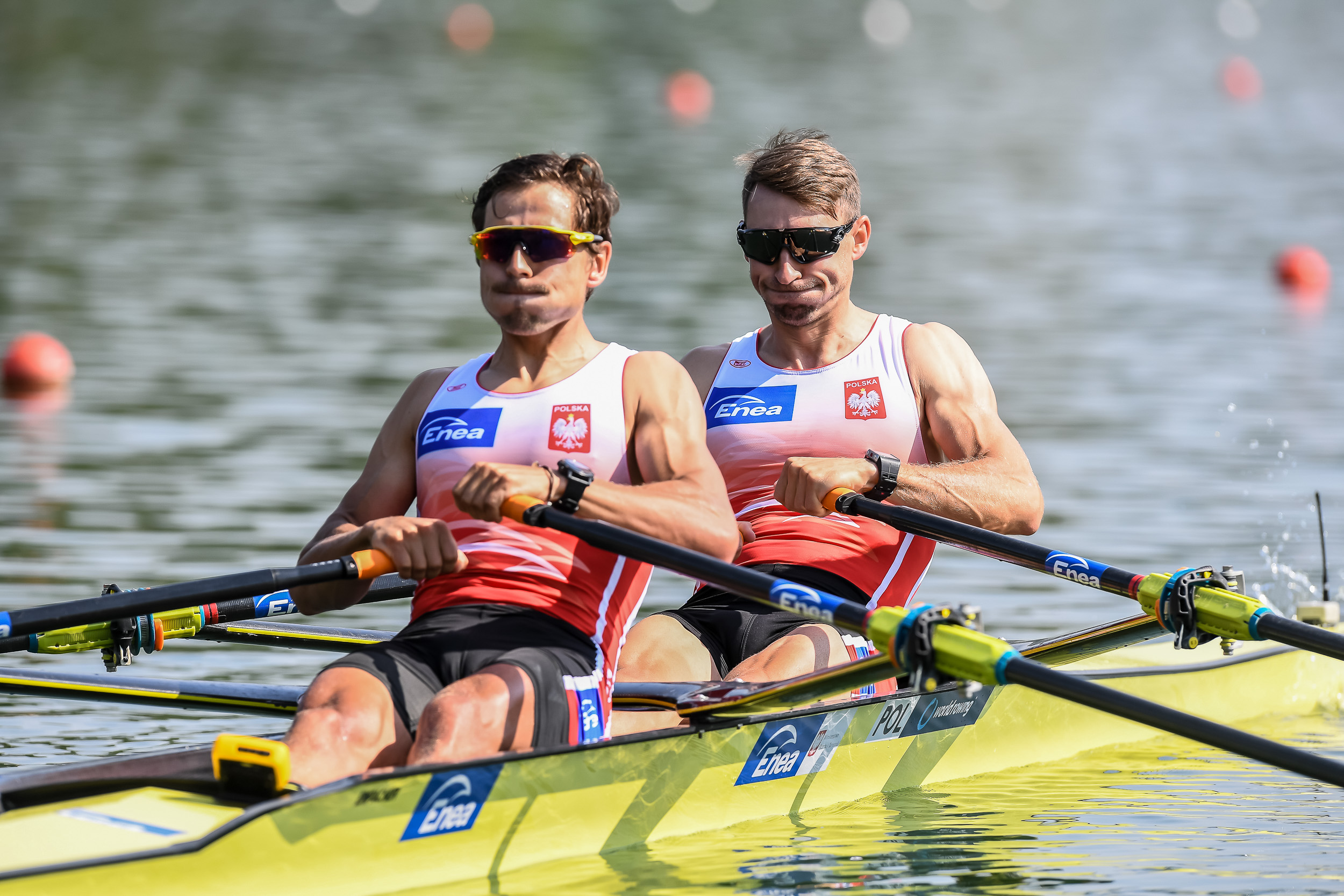 Polska dwójka podwójna kategorii lekkiej, Artur Mikołajczewski, Jerzy Kowalski - zawody w 2019 roku